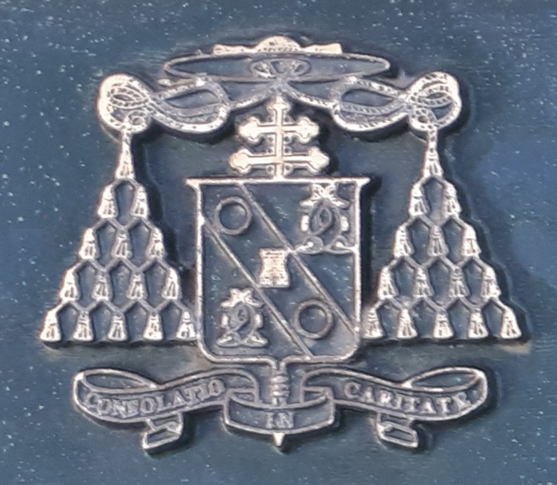 Escudo del cardenal Mario Casariego en Figueras (Asturias - España). Presenta en su parte inferior el lema en latín: CONSOLATIO IN CARITATE.